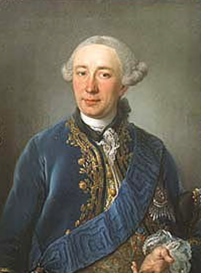 Portrait of Heinrich Schimmelmann (1734-1782)